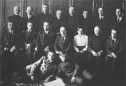 1-я Усебеларуская нарада архівістаў 12 — 15 мая 1924 г., г. Мінск. Стаяць злева направа: У. Г. Краснянскі, Б. Р. Брэжга, І. Ф. Жалкевіч, І. В. Дамінікоўскі, М. А. Вахаеў, П. Я. Тараймовіч, І. А. Сербаў, В. Д. Друшчыц. Сядзяць злева направа: Я. Л. Дыла, М. В. Мялешка, С. М. Некрашэвіч, З. Ф. Жылуновіч, Э. К. Лэйланд, Д. І. Даўгяла, У. І. Пічэта. Ляжаць злева направа: І. М. Барашка, Г. І. Баброўскі.